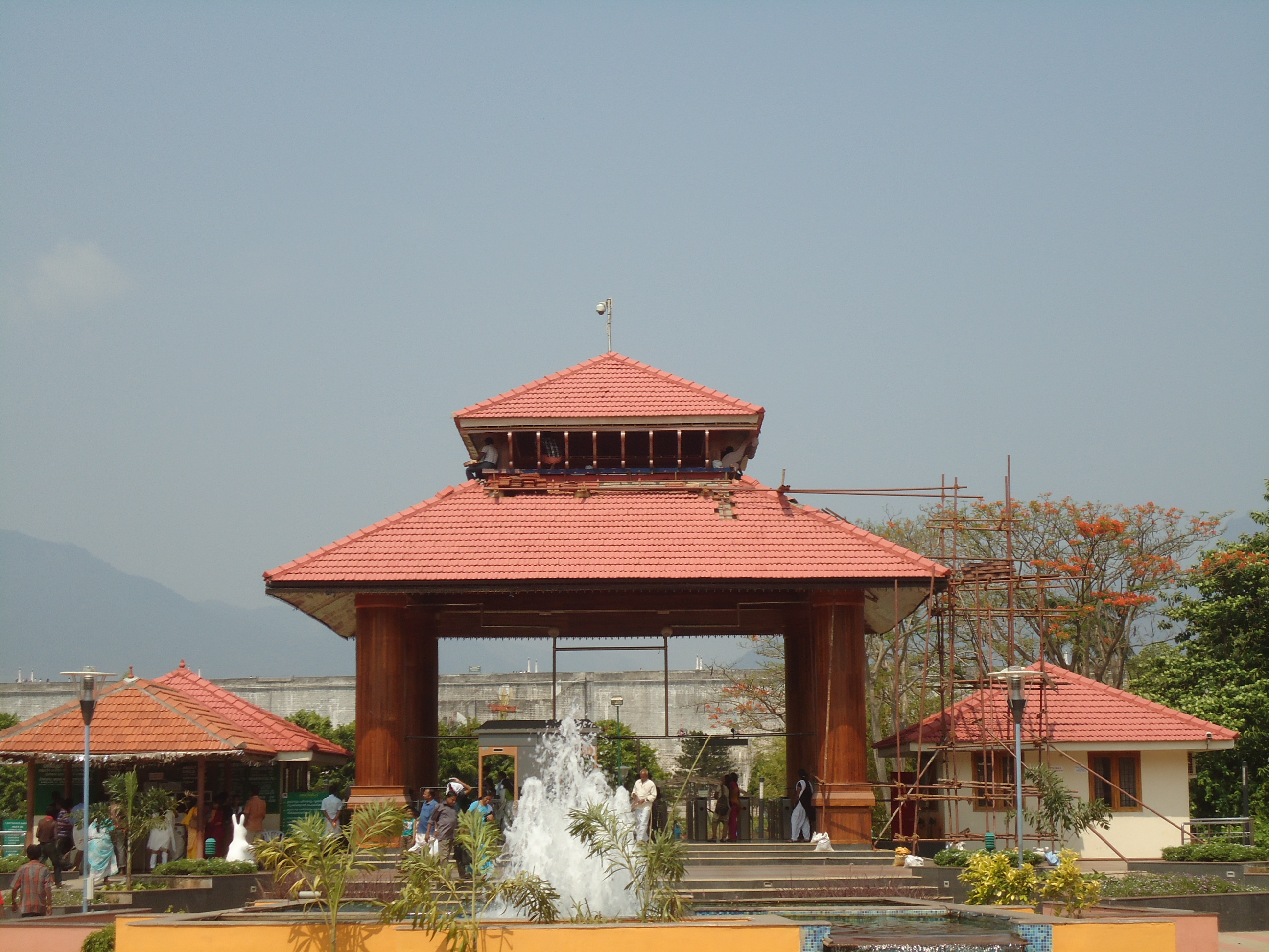 Malampuzha Garden Entrance